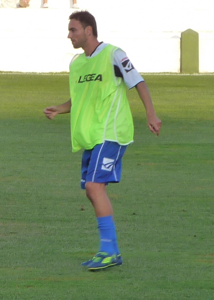 Momo-XerezCD-p1040355.jpg